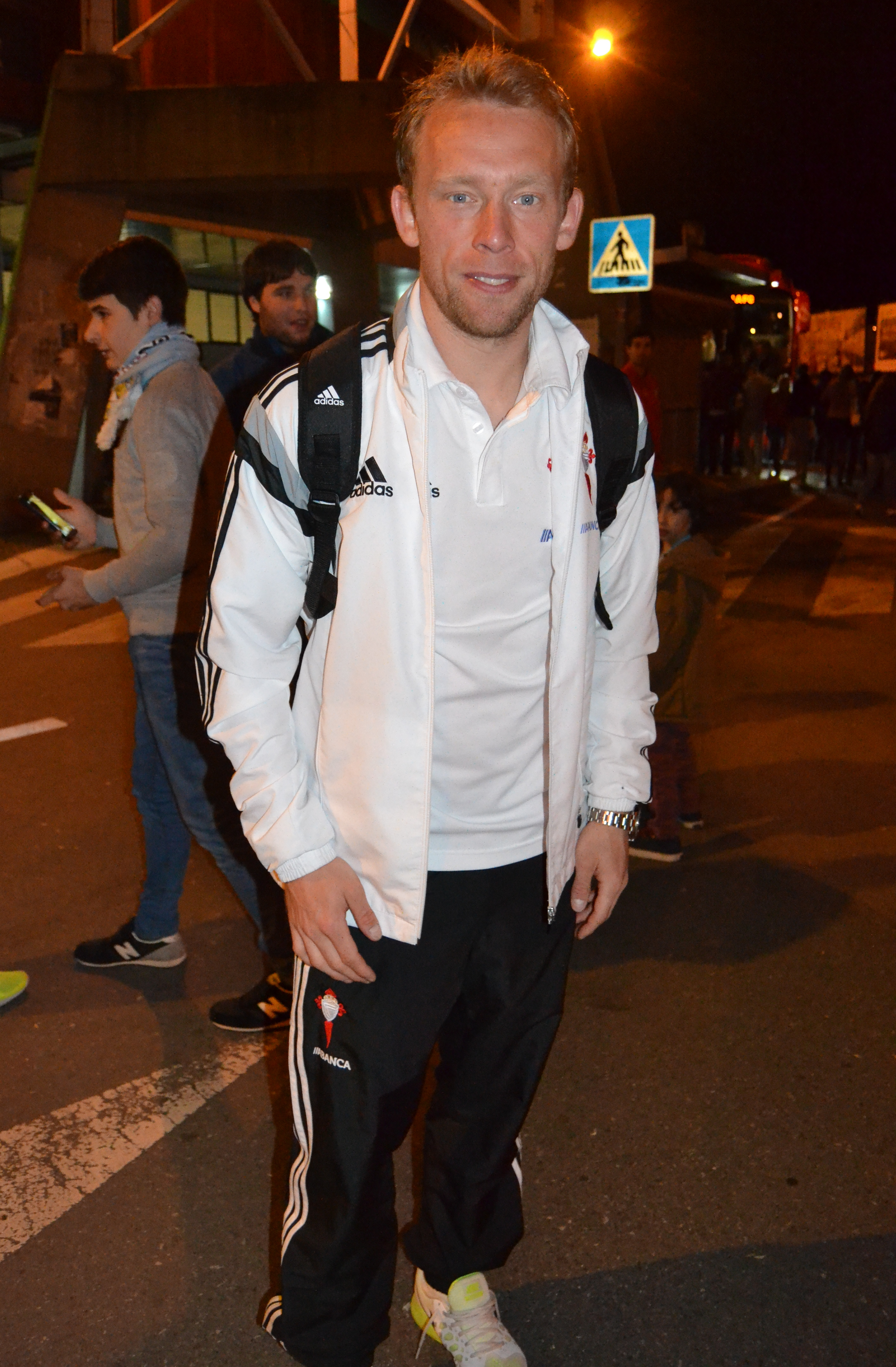 O futbolista Michael Krohn-Dehli